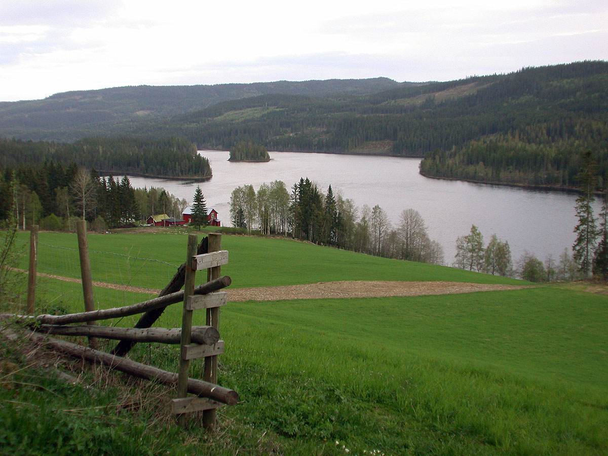 Ringsjøen, Snertingdal, Oppland